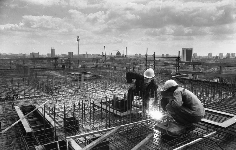 Berlin, Bau der Charite ADN-ZB/Weißflog / 21.7.80 / Jugend / Berlin: Gut voran gehen die Arbeiten am größten Investitionsobjekt das Hochschul- und Gesundheitswesen der DDR, beim Neubau und der Rekonstruktion der Berliner Charité. Gegenwärtig konzentrieren sich die Bauarbeiter, die dieses Objekt im Rahmen der FDJ-Initiative Berlin übernommen haben, auf das Chirurgisch Orientierte Zentrum, das mit 26 Operationssälen und 800 Betten zum Herzstück der Charité werden wird.